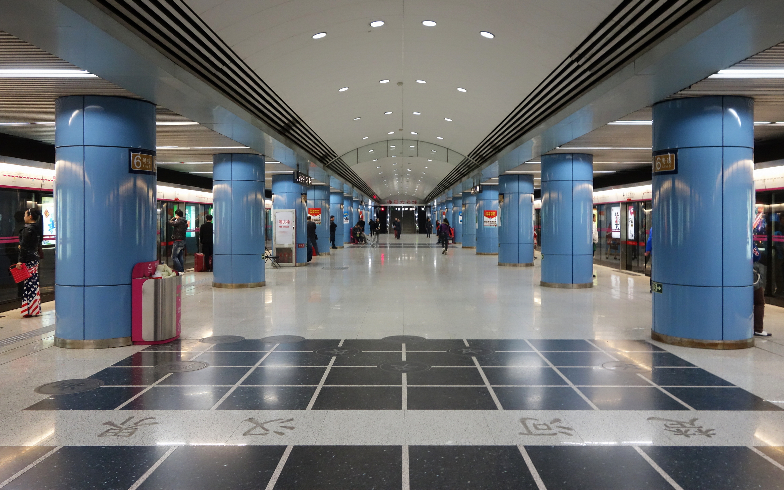 5号线东四车站的站台, 地面铺有中国象棋残局的装饰.